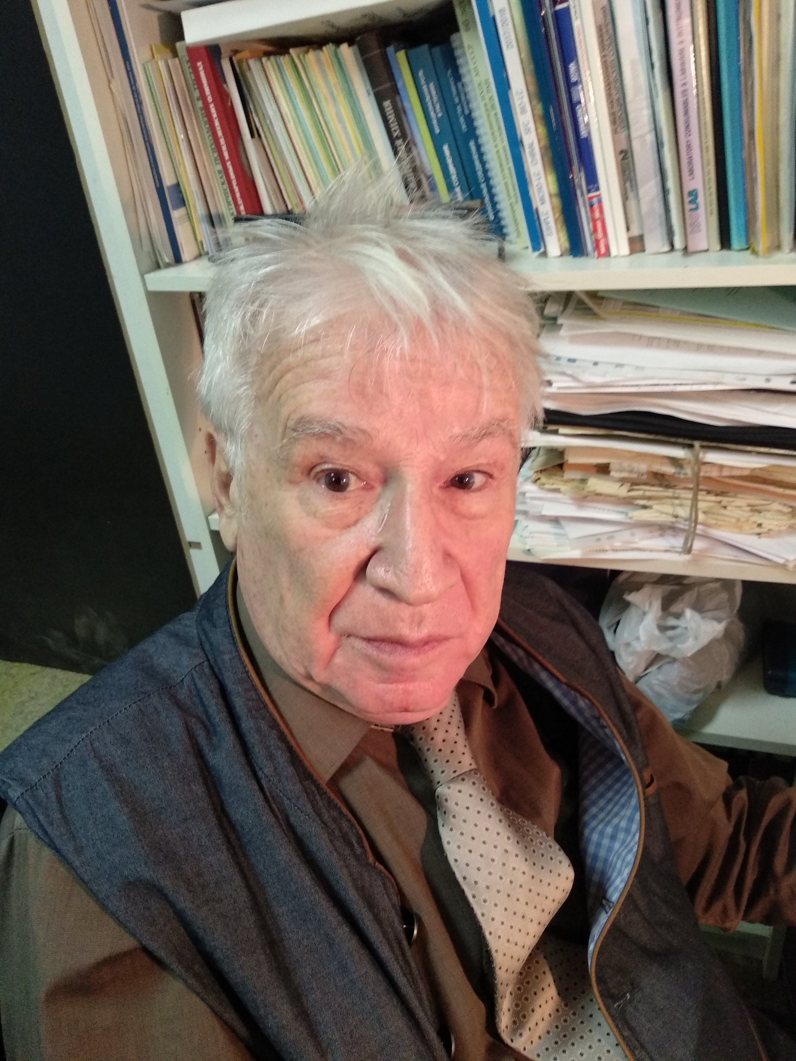 Фотография С.Л. Иоффе